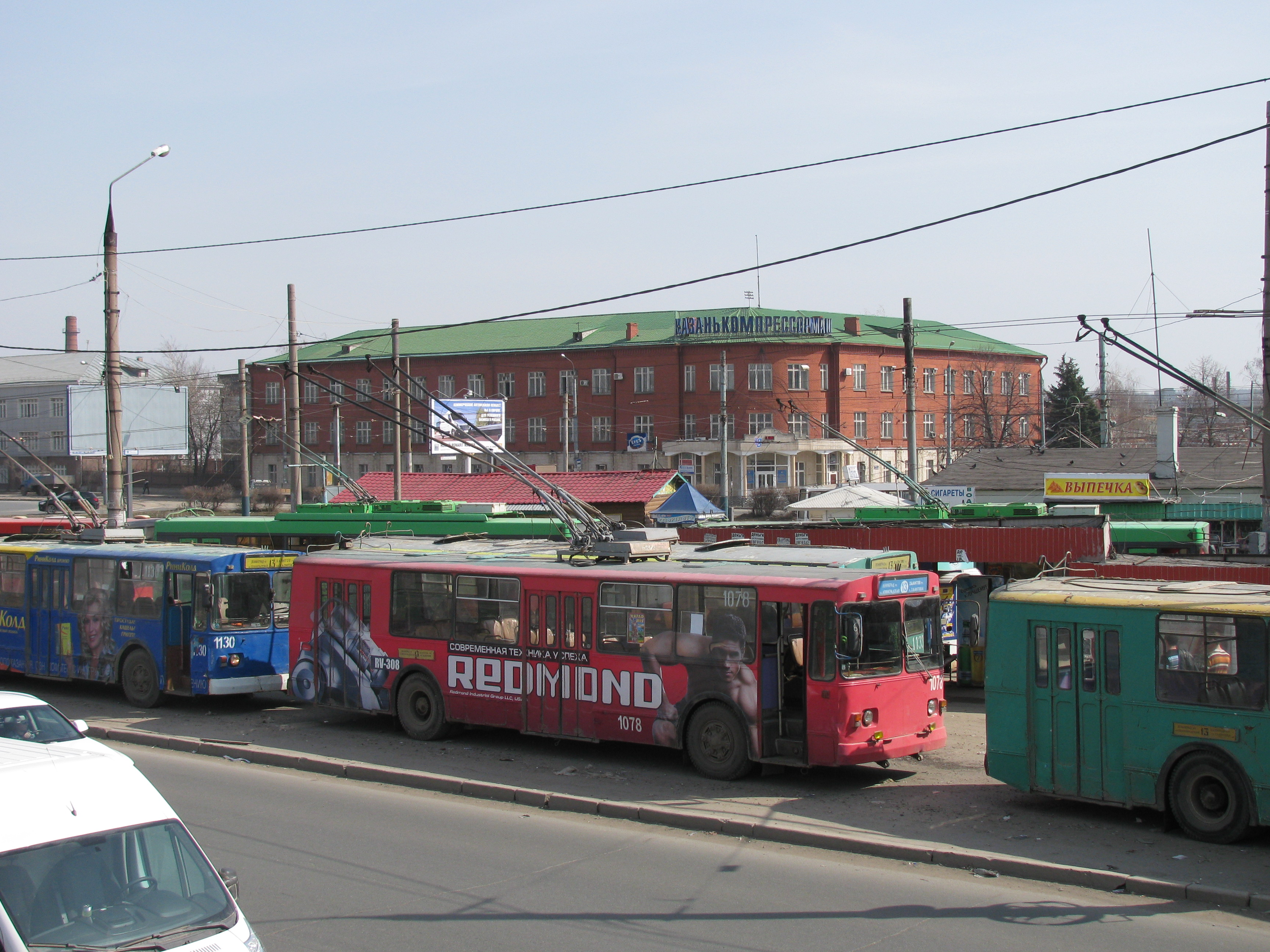 Здание администрации завода Казанькомпрессормаш